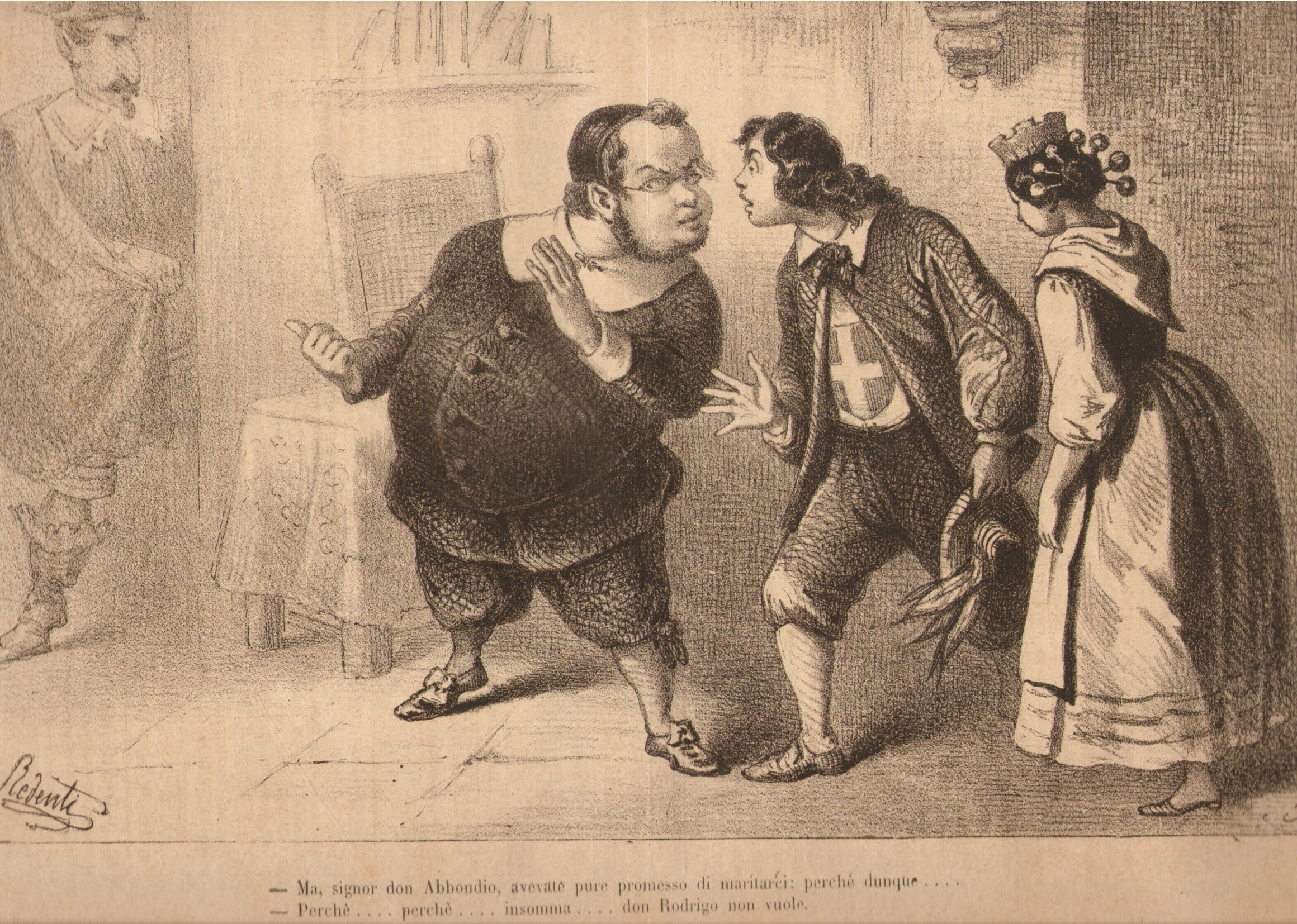 La situazione in Italia nel 1857 vista attraverso i Promessi Sposi di Alessandro Manzoni. Renzo (Piemonte) a fianco di Lucia (Italia) dice a don Abbondio (Cavour) "avevate pure promesso di maritarci..." e don Abbondio risponde: "don Rodrigo (Napoleone III) non vuole".